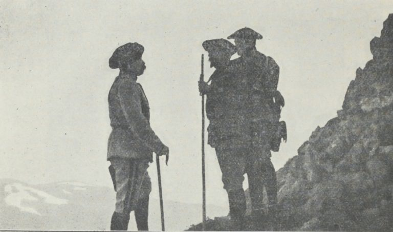 Au sommet du Schnepfenrieth [Schnepfenried], le général SERRET s'entretient avec le commandant COQUET.